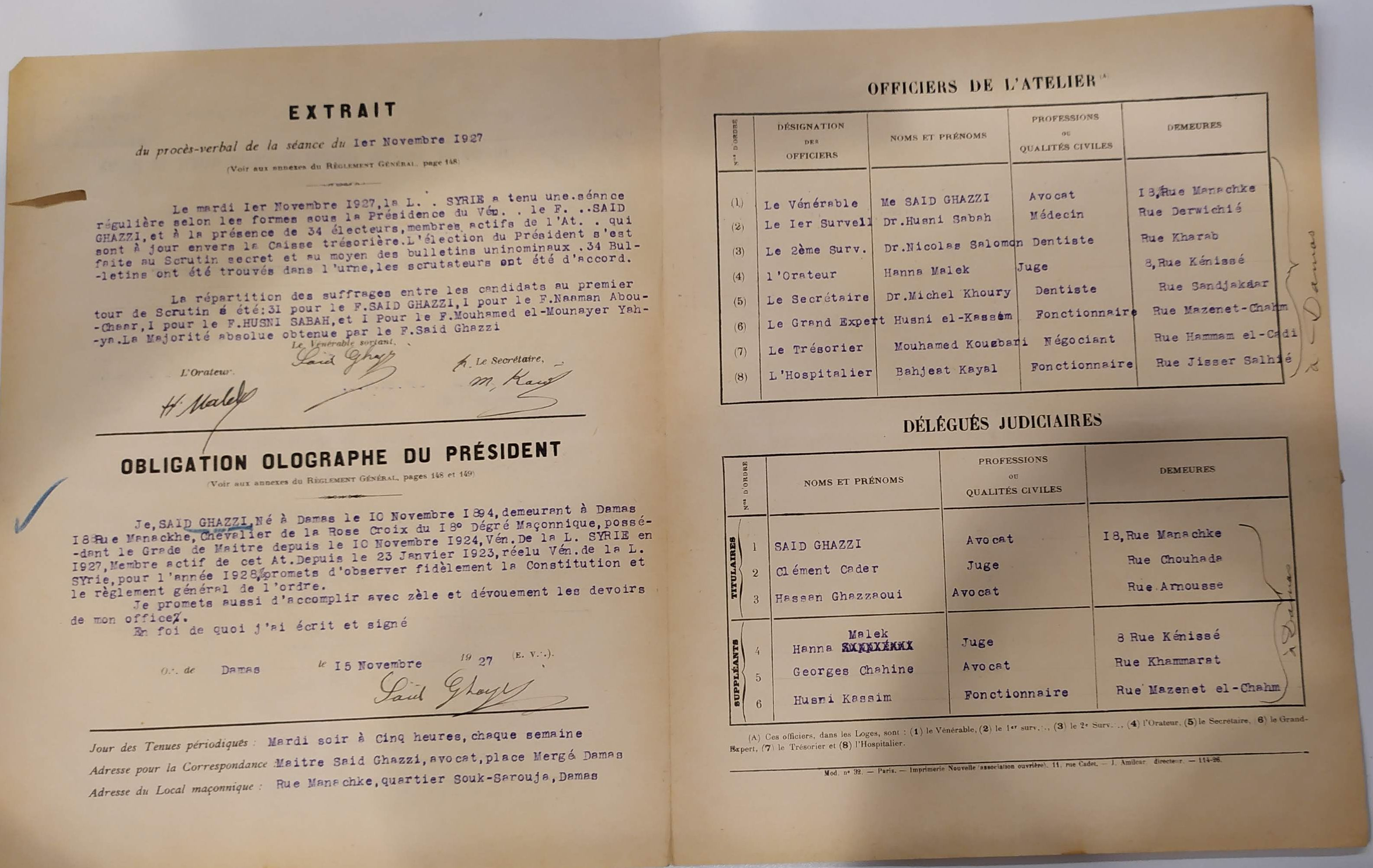 Collège des officiers loge Syrie de Damas 1927 verso